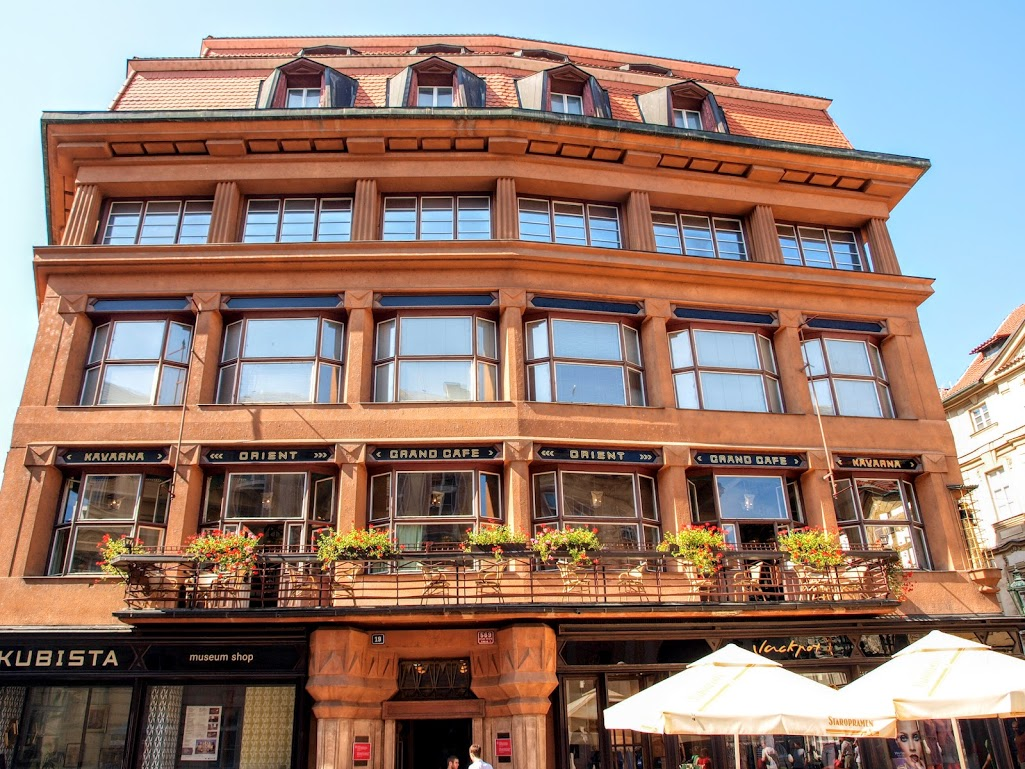 Dům U černé Matky Boží